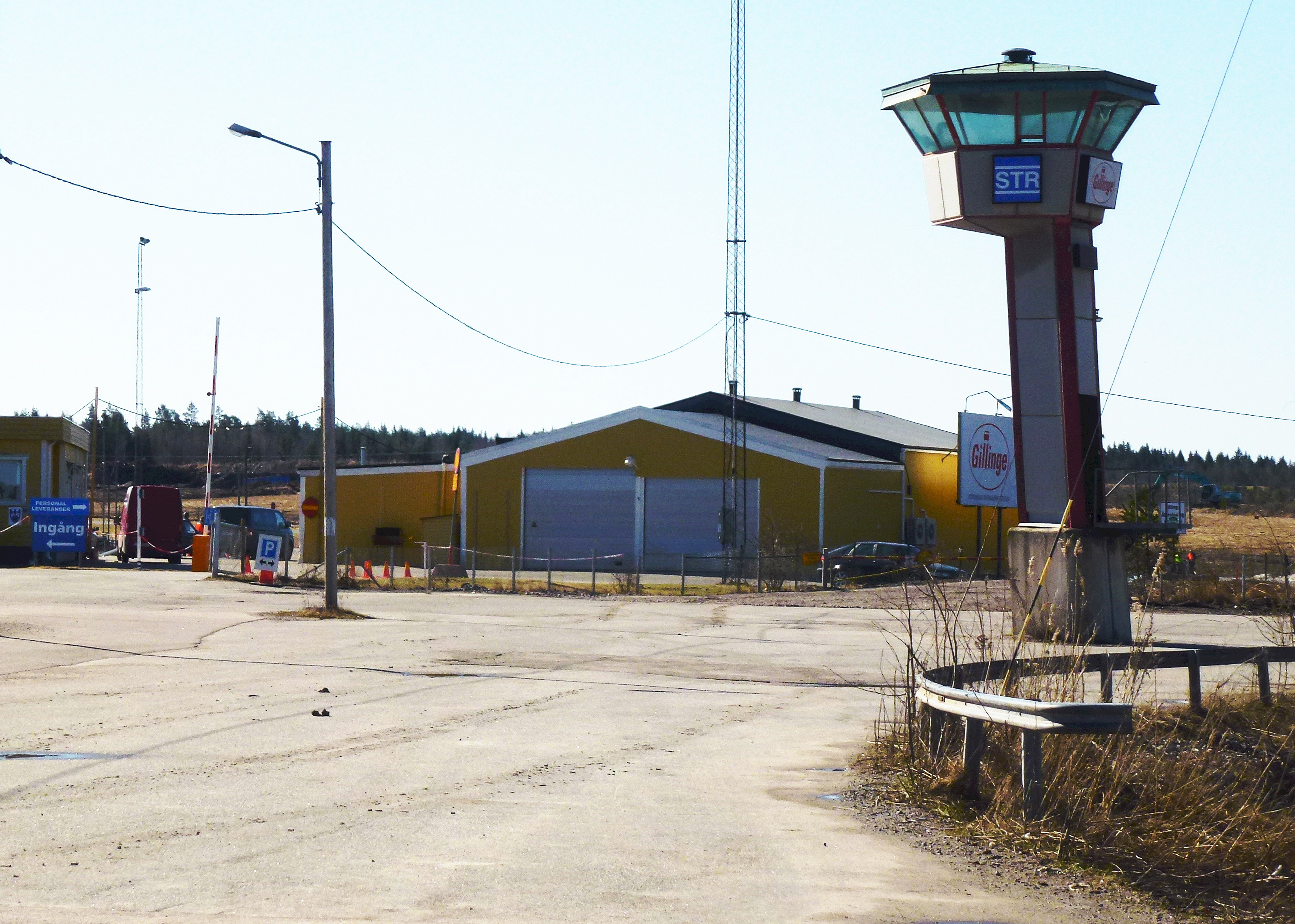 Kontrolltornet på Stockholms Trafiksäkerhetscenter Gillinge AB